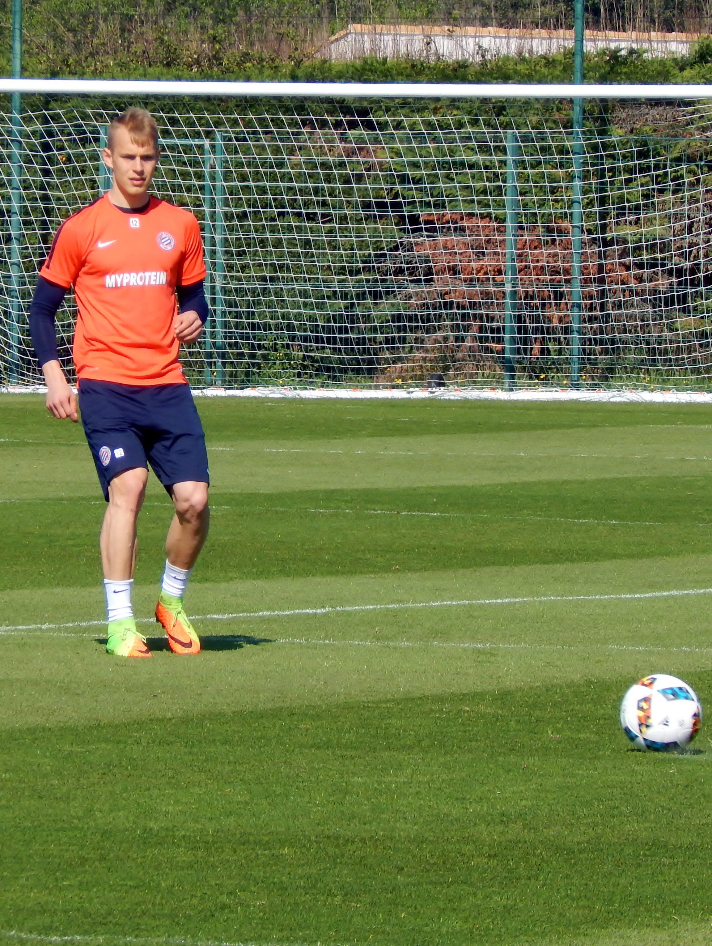 Lukas Pokorny (MHSC), 2017.